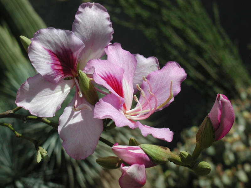 Bauhinia variegata